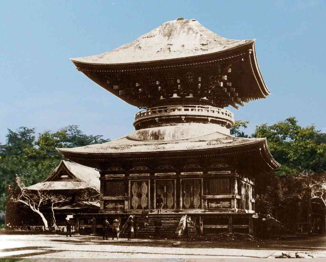 The Yakushidō (薬師堂) at Tsurugaoka Hachimangū in Kamakura during the Meiji Era. The finial had been removed.